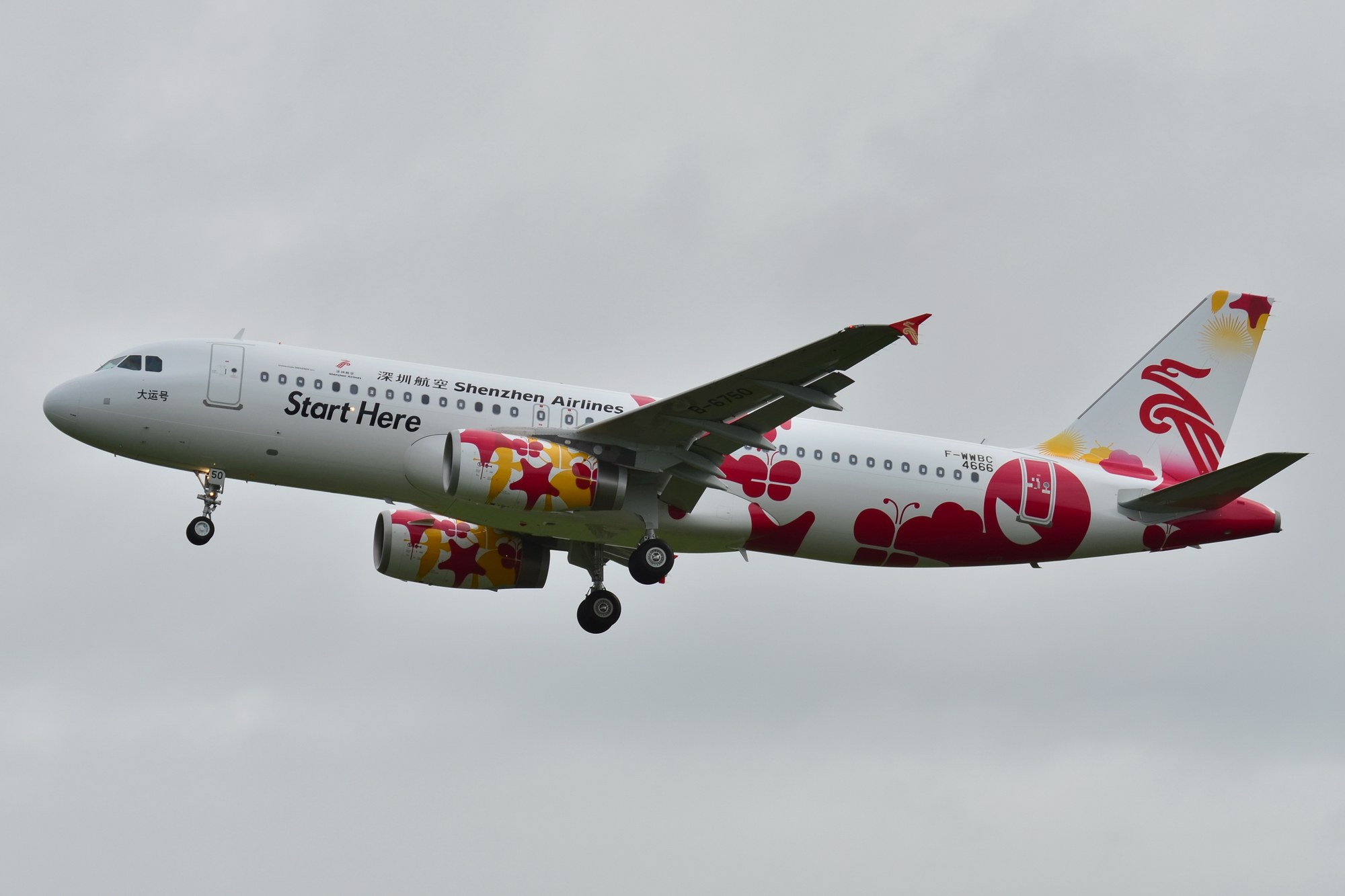 Photo prise à l'aéroport de Toulouse-Blagnac (LFBO) en France. Picture take at Toulouse-Blagnac Airport (LFBO) in France.